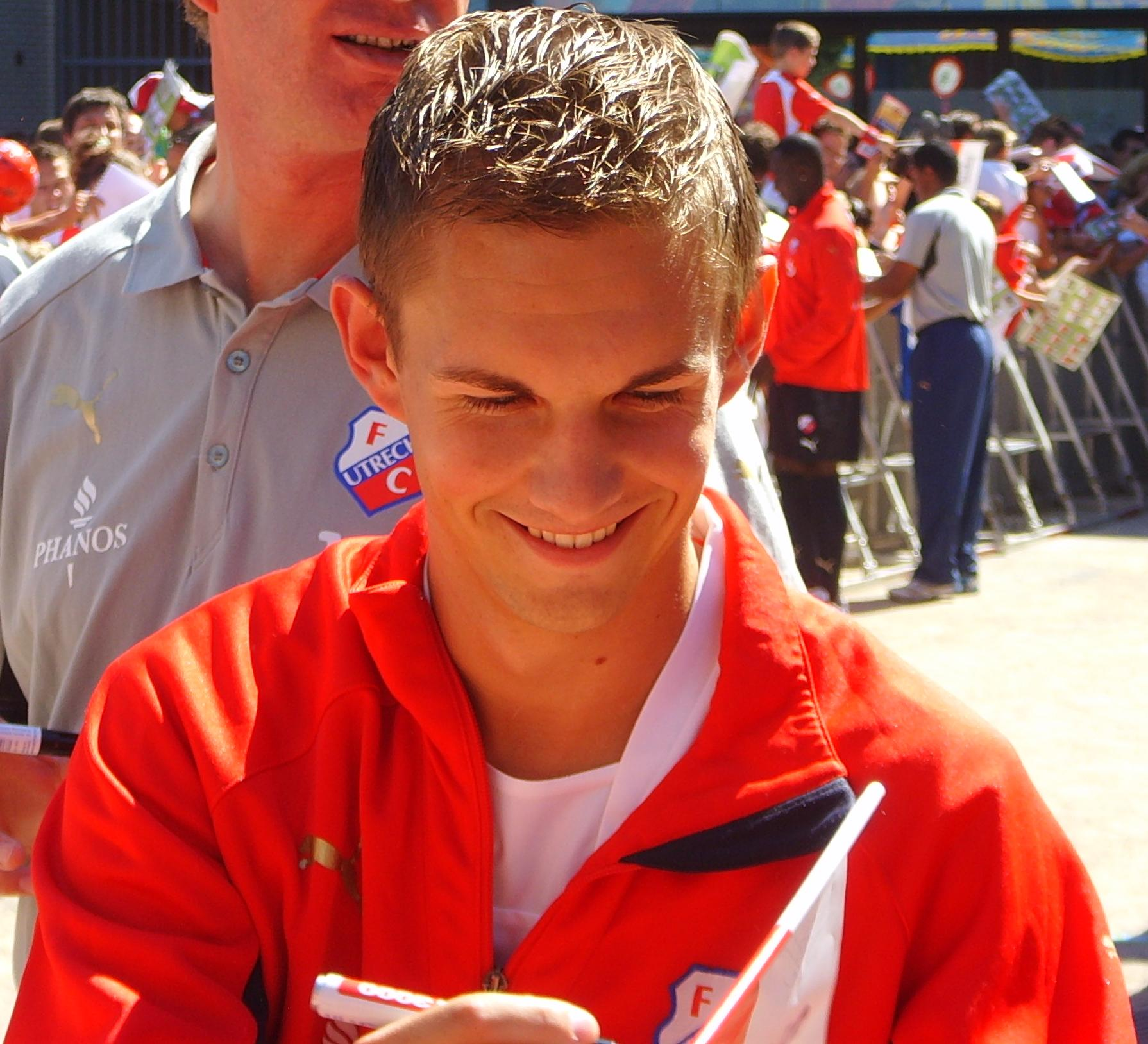 Kevin Vandenbergh, Belgian footballer